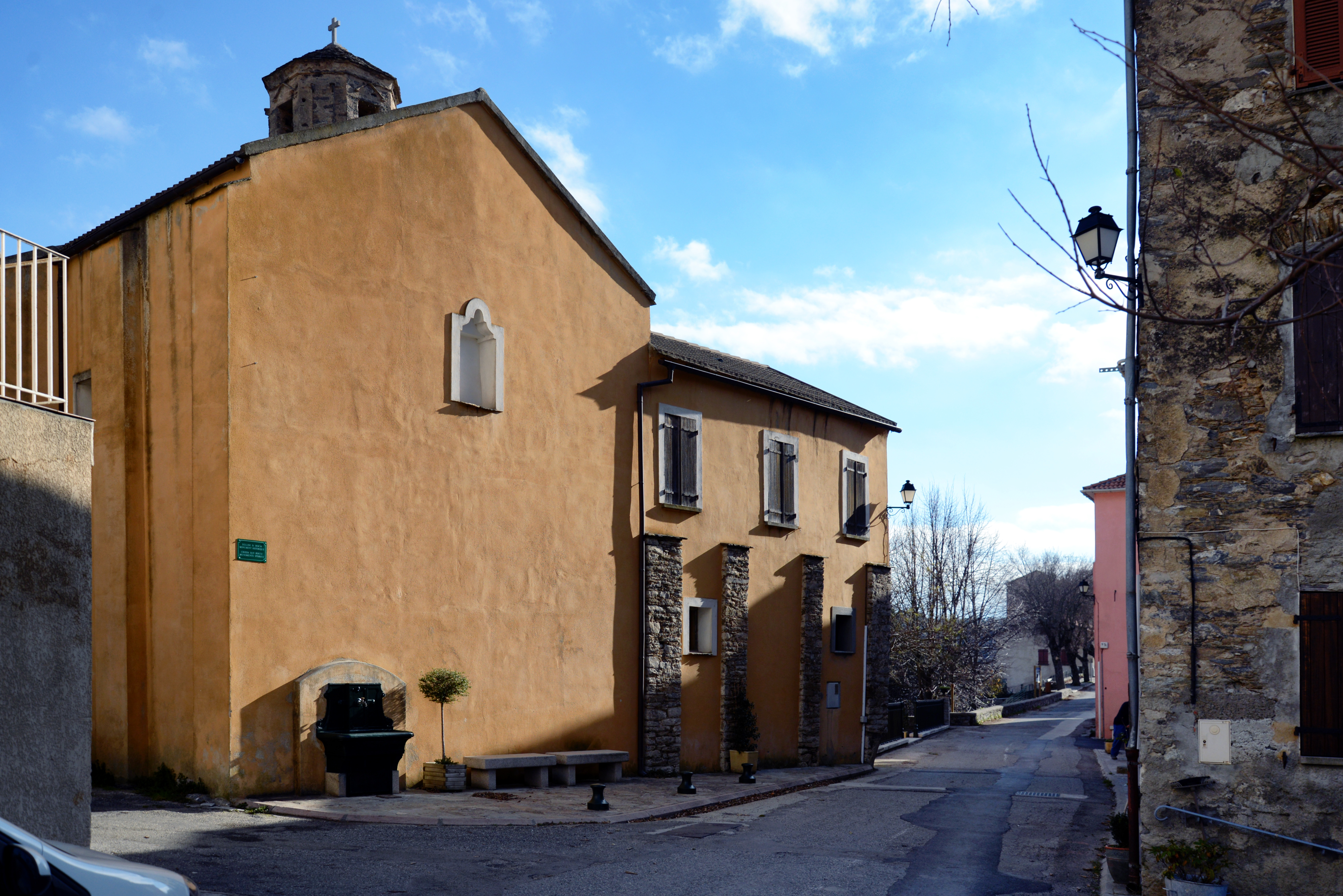 Pietraserena, Castagniccia (Haute-Corse) - chevet de l'église paroissiale Saint-Roch